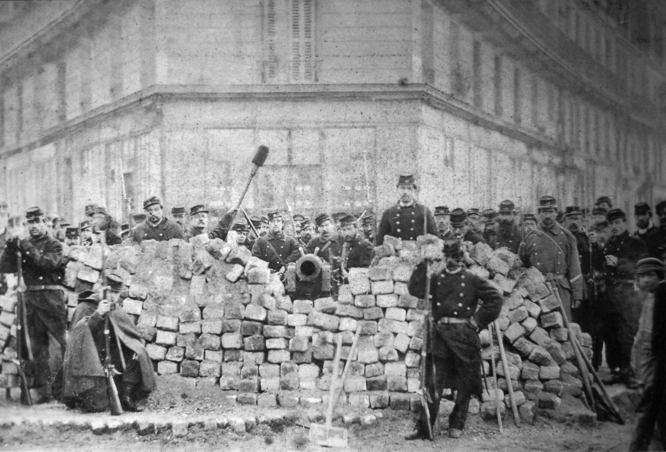 Barricade à l'angle des boulevard Voltaire et Richard-Lenoir pendant la Commune de Paris de 1871. Cliché pris à l'occasion de l'exposition "La Commune 1871, Paris capitale insurgée" à l'Hôtel de ville de Paris le 5 avril 2011.